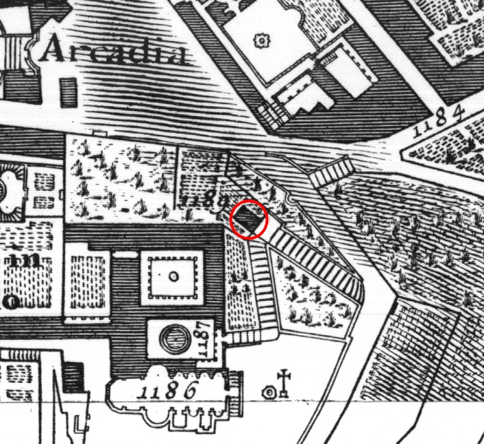 Pianta di Nolli